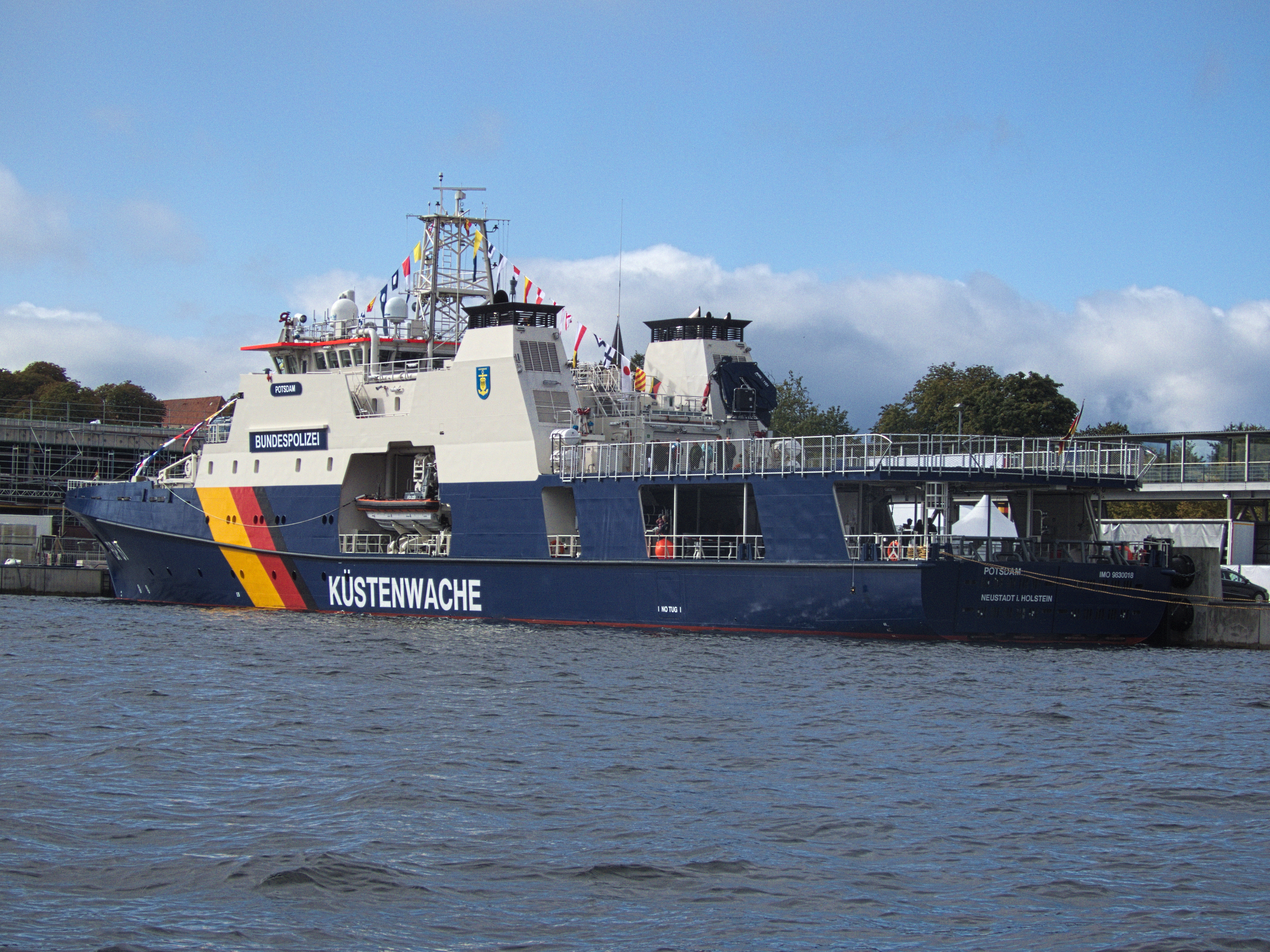 BP81 Potsdam der Bundespolizei auf dem Tag der deutschen Einheit in Kiel 2019.